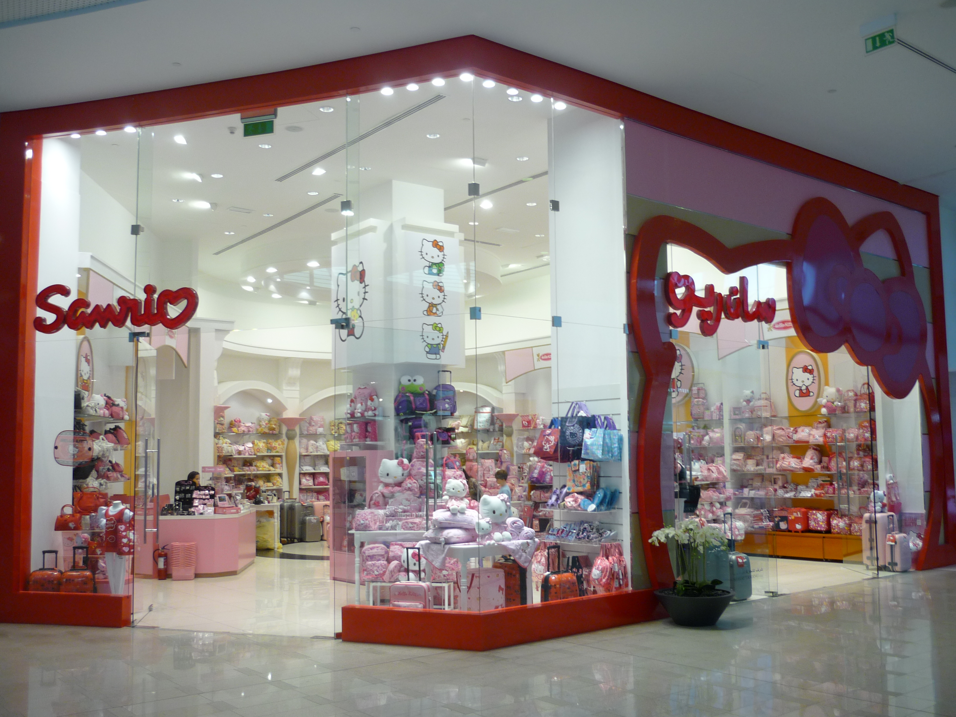 Hello Kitty-Shop